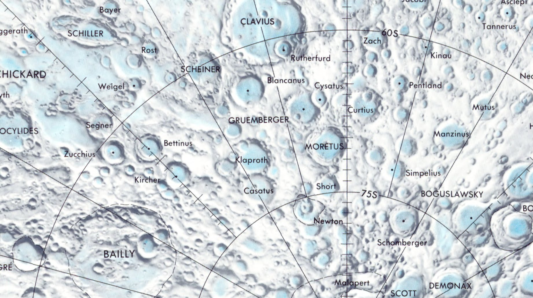 Cráter lunar Zucchius. Localización. (Lunar Chart LPC1. Second Edition)